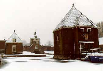 bron: kruithuis.nl - toestemming via email tot plaatsen in publieke domein